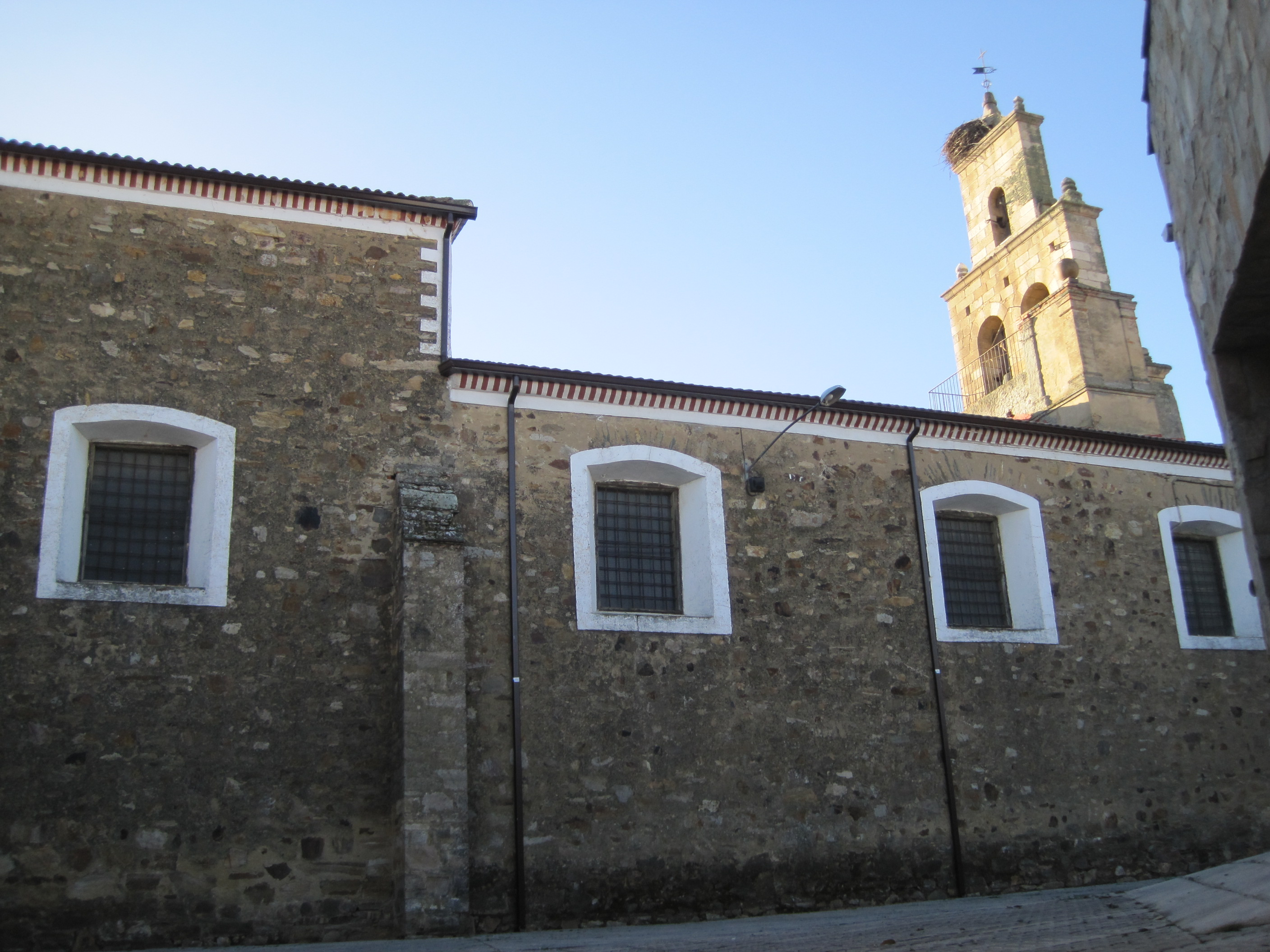 Iglesia de Palacios de la Valduerna (León, España).